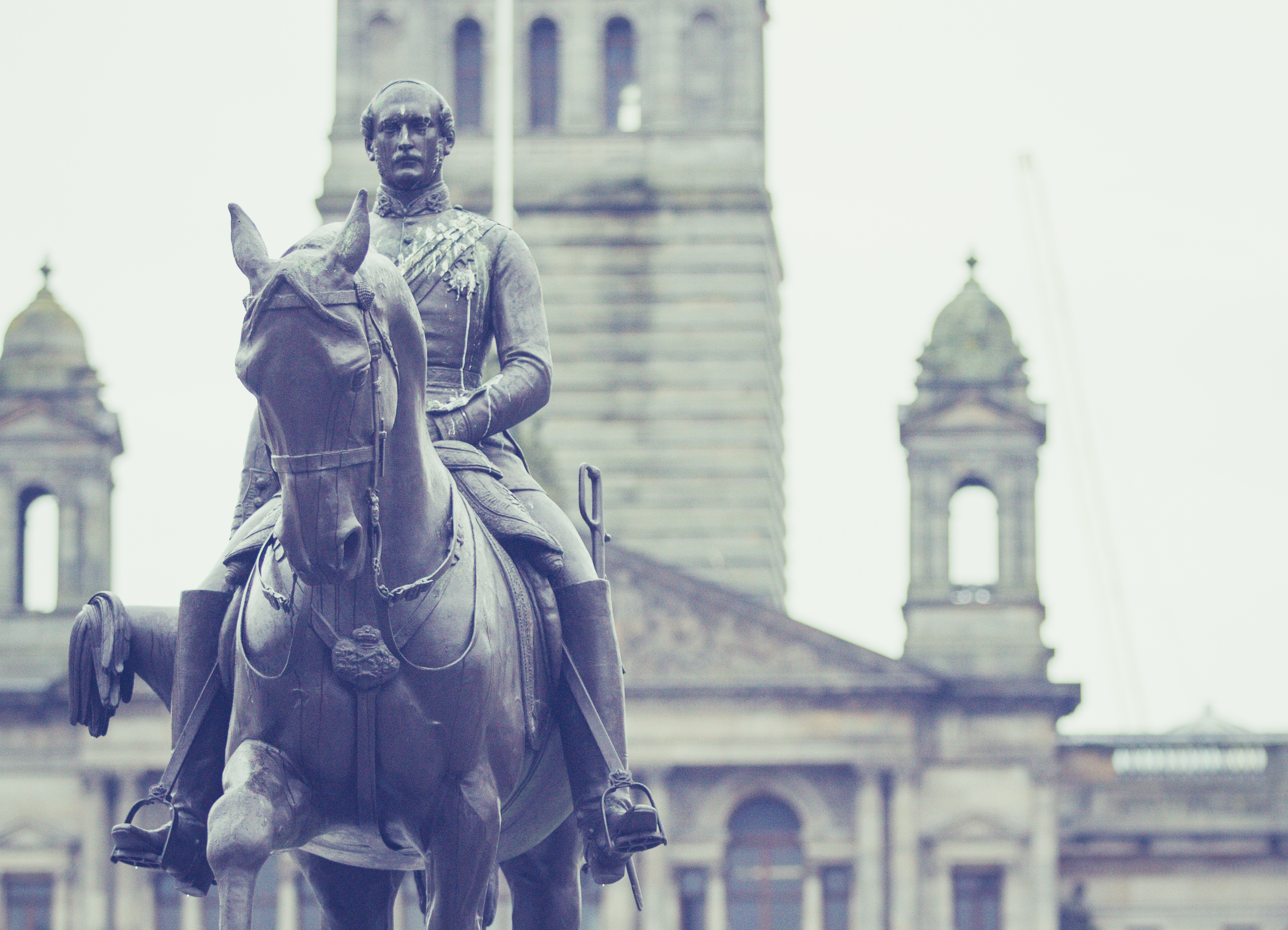 Glasgow